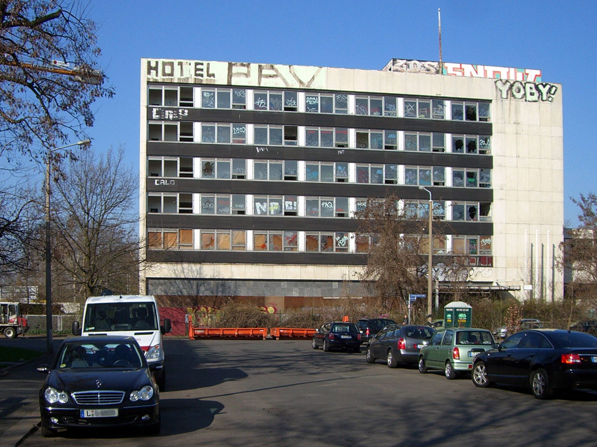 Das ehemalige Gästehaus der Ministerrates der DDR in Leipzig, Schwägrichenstraße 16 belegt das gesamte Areal der im Zweiten Weltkrieg zerstörten oder beschädigten Villen zwischen Schwägrichenstraße und Karl-Tauchnitz-Straße. Architekt: Wolfgang Scheibe (1928–2006)